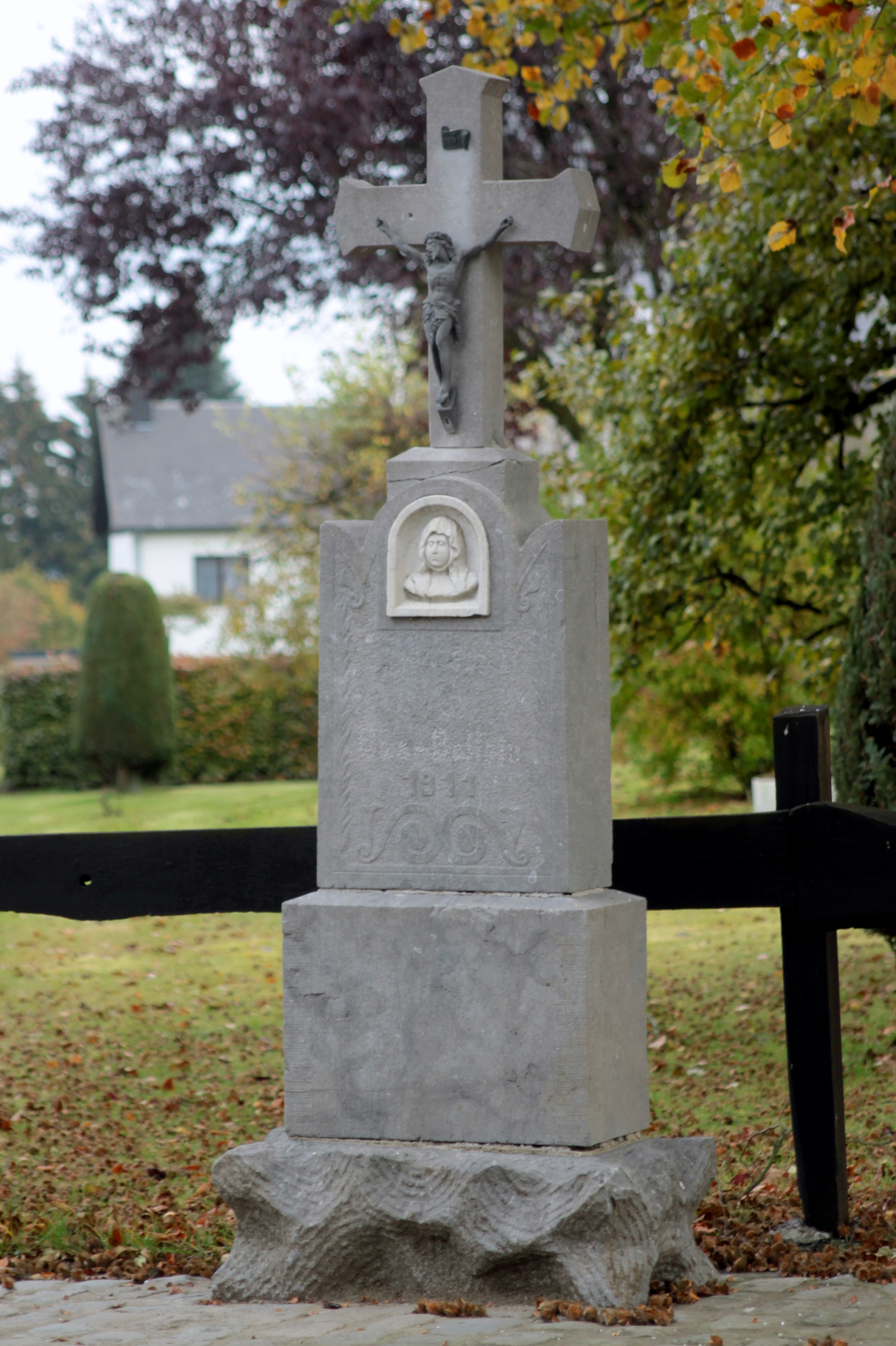 Weekräiz zu Beesslek